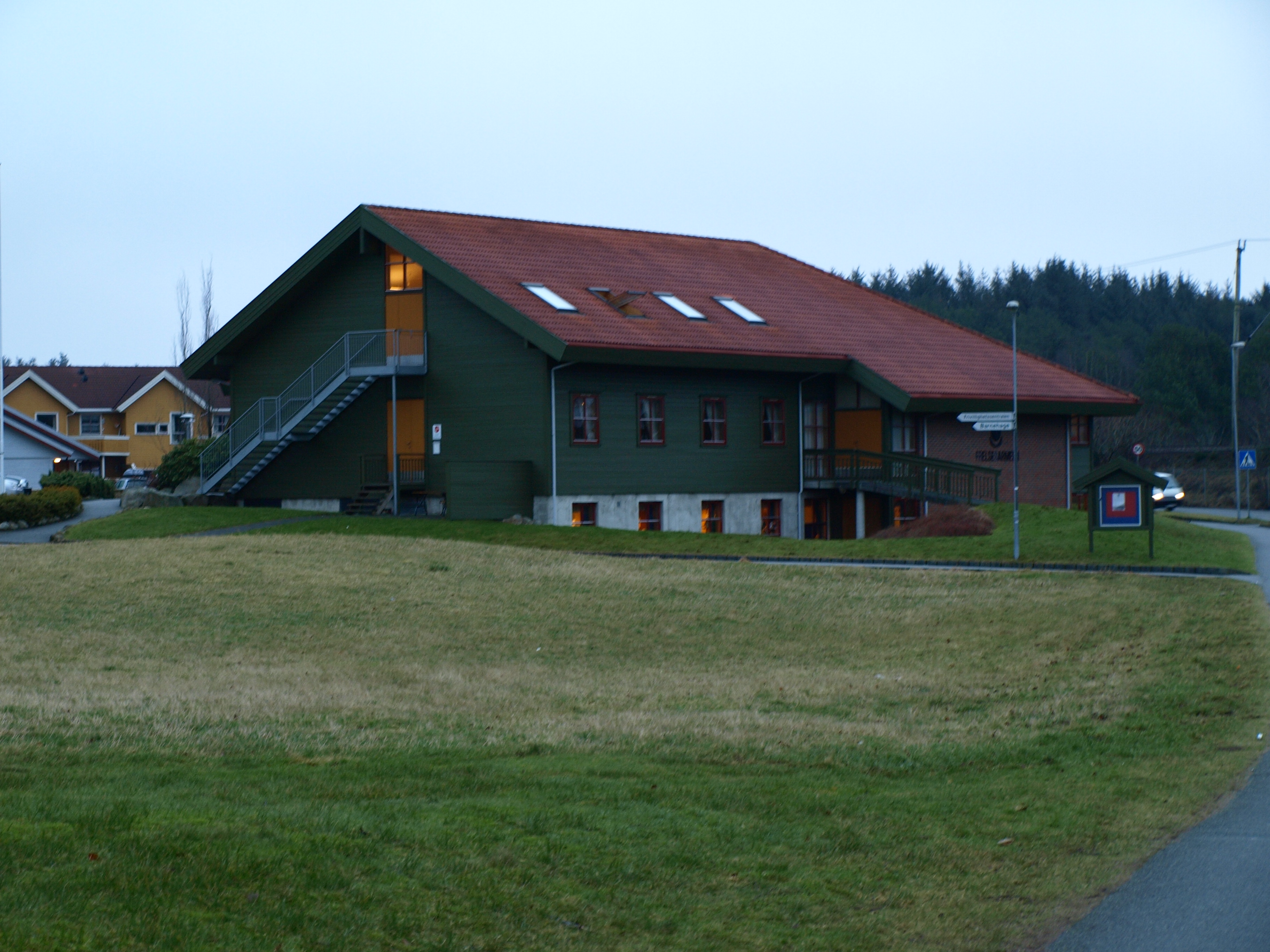 Foto av Frelsesarmeen Bryne lokaler i Vardheivegen 4